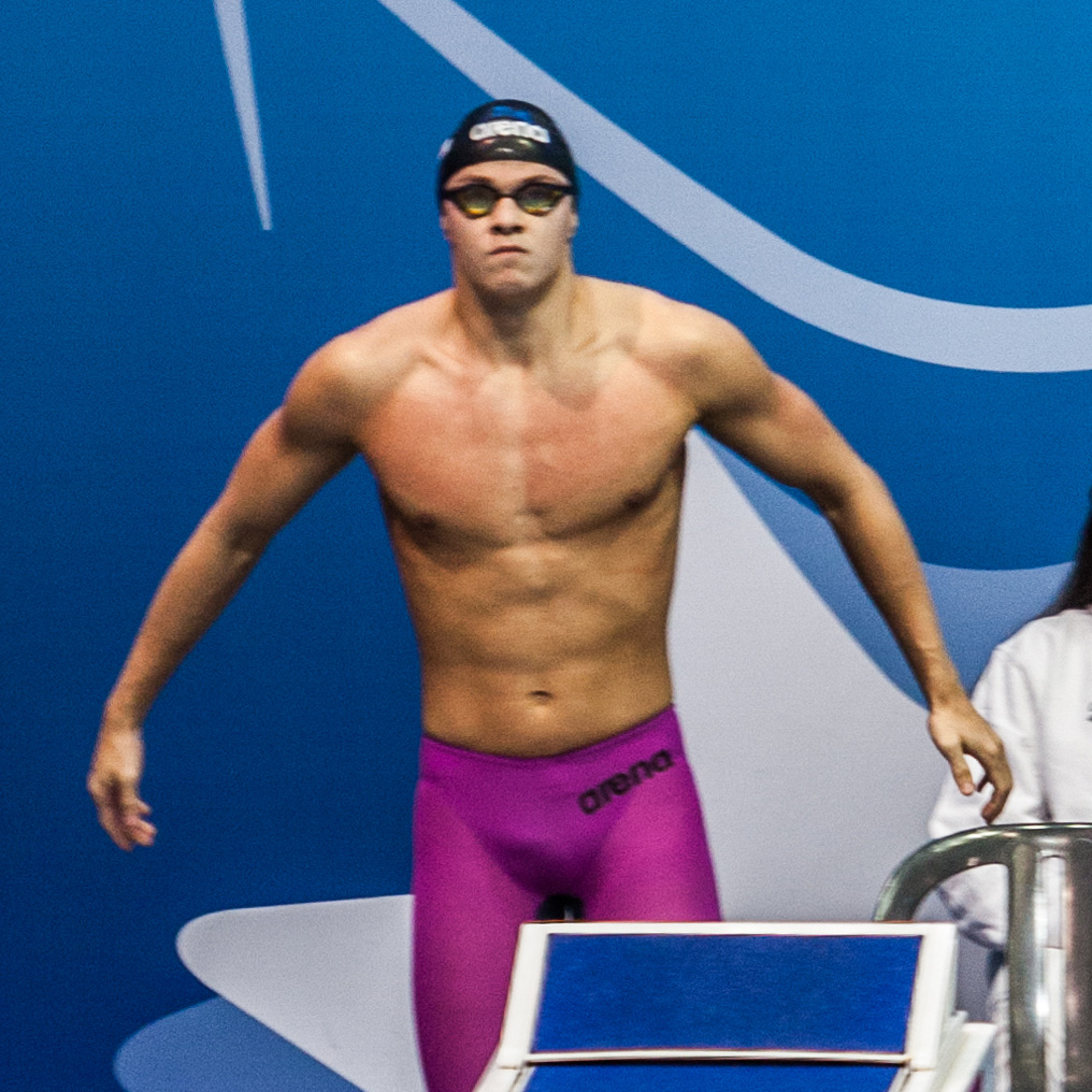 השחיין ויקטר סטסלוביץ' באליפות אירופה בבריכות קצרות בנתניה, 2015